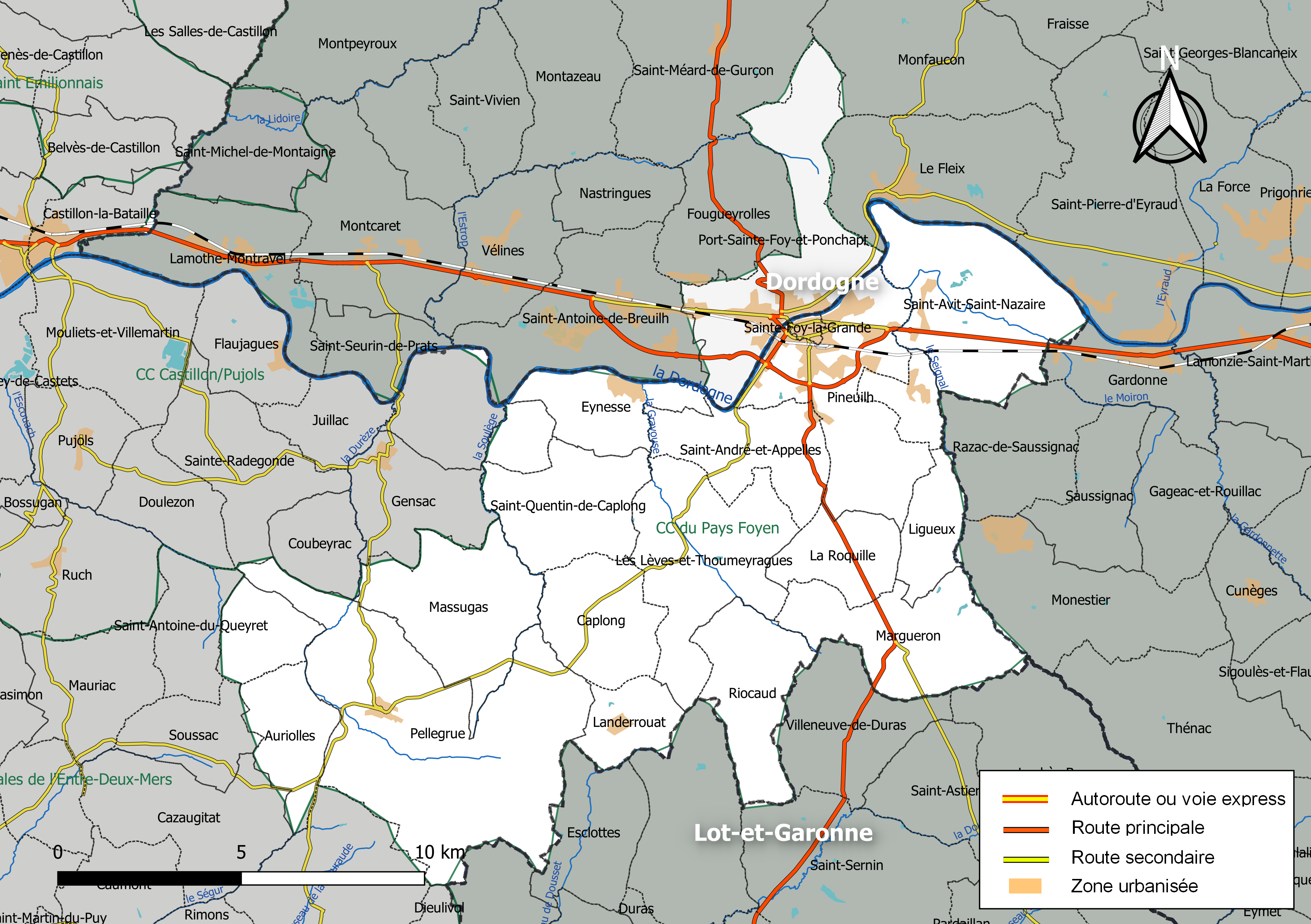 Carte géographique de la Communauté de communes du pays Foyen, département de la Gironde, France. Composition au 1er janvier 2019.